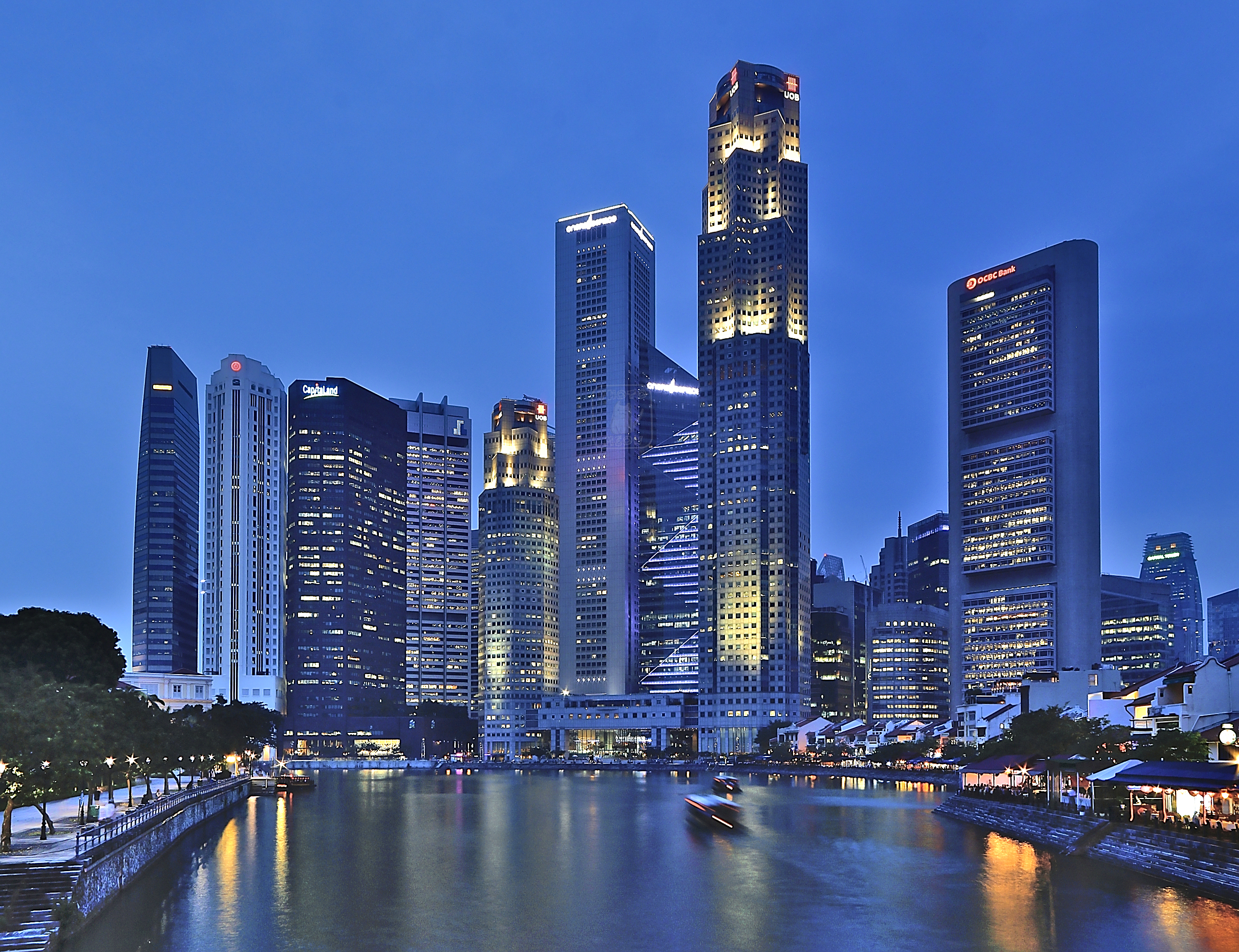 Taken from Elrin bridge